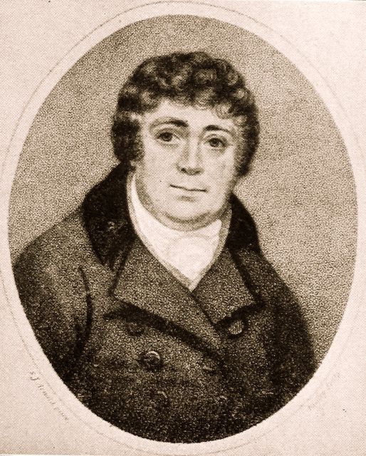 Retrato de Samuel Arnold (1740-1802), compositor y organista inglés